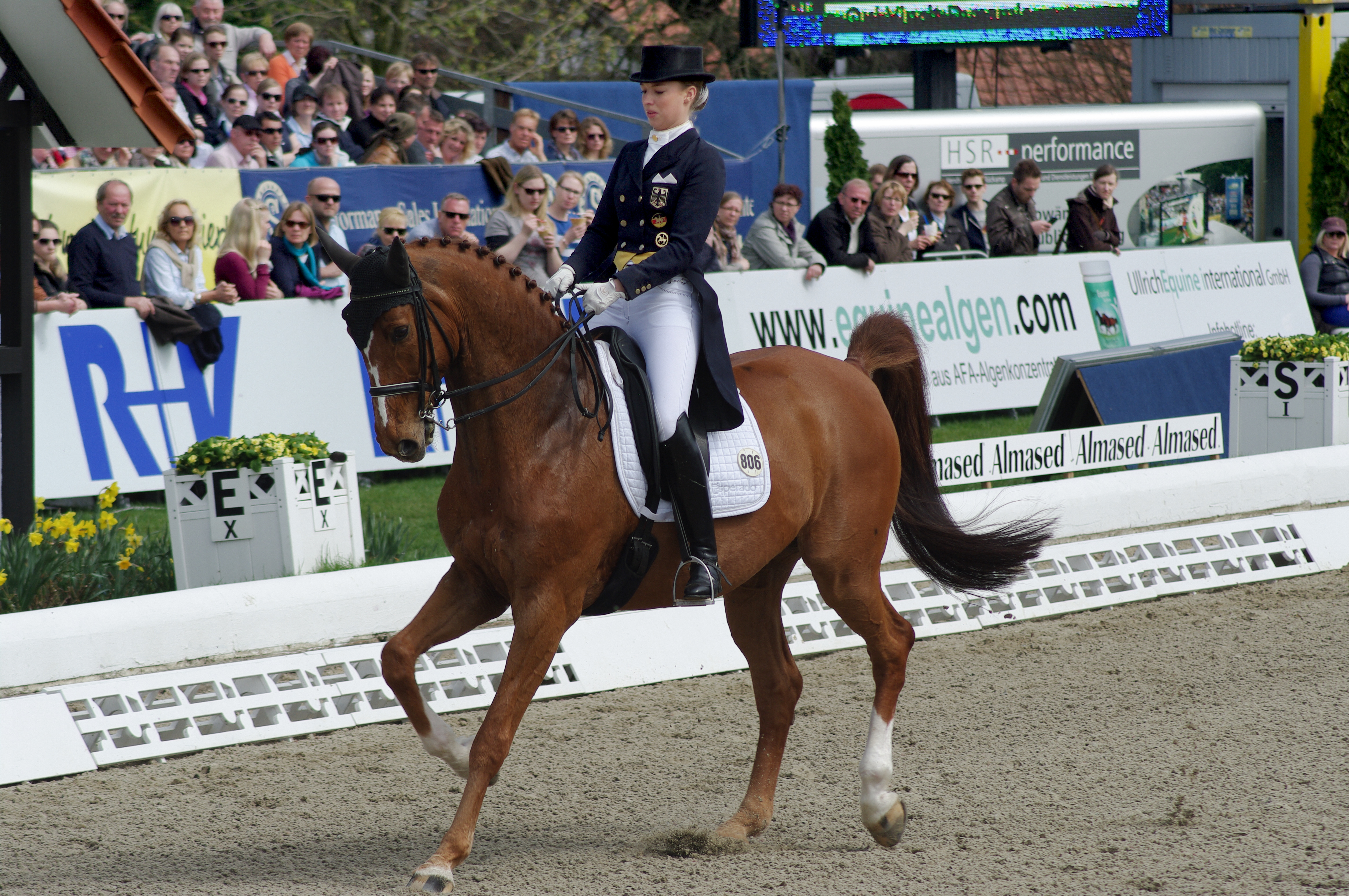 Horses & Dreams 2013: Nr. 6 CDI4* FEI Grand Prix Kür (Preis der Firma Ullrich Equine international GmbH - "in Memoriam George Theodorescu") Fabienne Lütkemeier mit " Qui Vincit Dynamis"